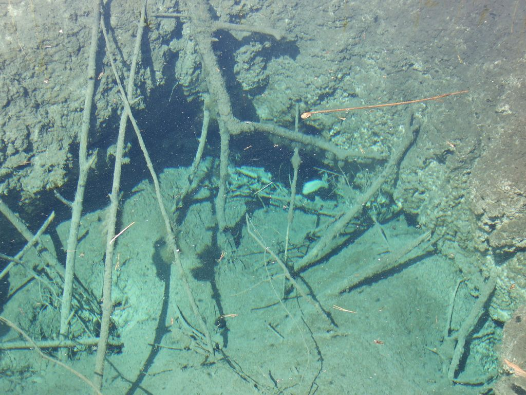 Ostersee, Bayern - Lake Oster, Bavaria